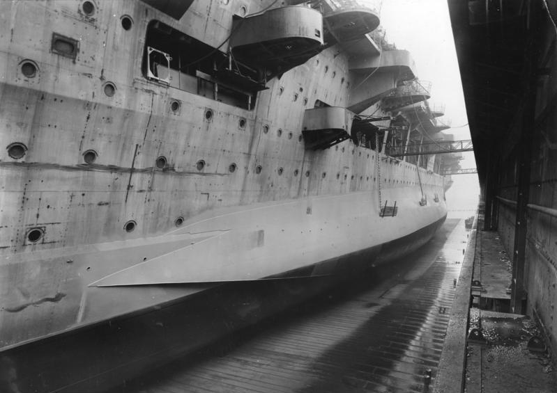 K 252 Ansicht BB vorn Kiel, d. 24.3.43 Deutsche Werke Kiel, Platte No. 22769